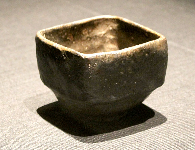 Особо ценный культурный объект. Основание и нижняя часть тулова имеют округлую форму. Верхняя часть тулова четырехугольная, что чрезвычайно редко встречается в чайных чашах, пожалуй, эта - единственная.